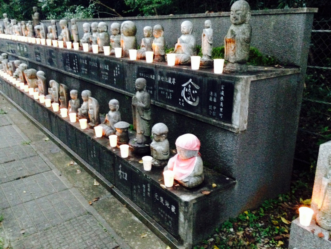 福井県越前市の御誕生寺での地蔵祭りの様子